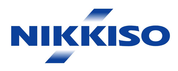 Logo von